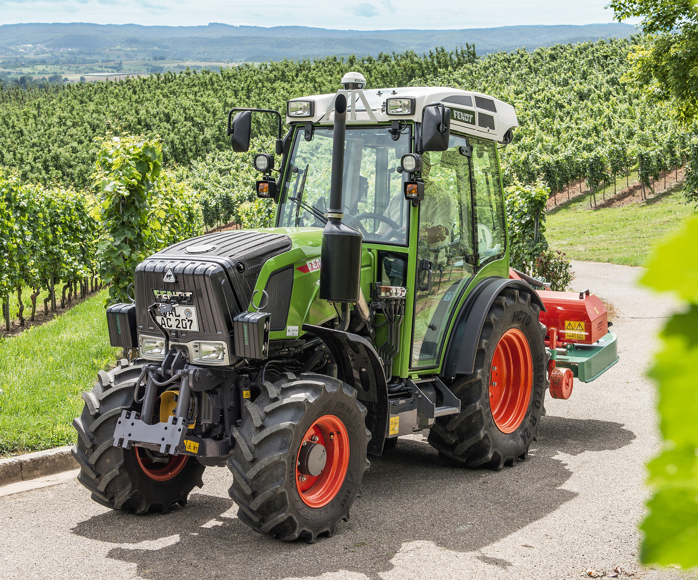 Fendt 200 V/F/P